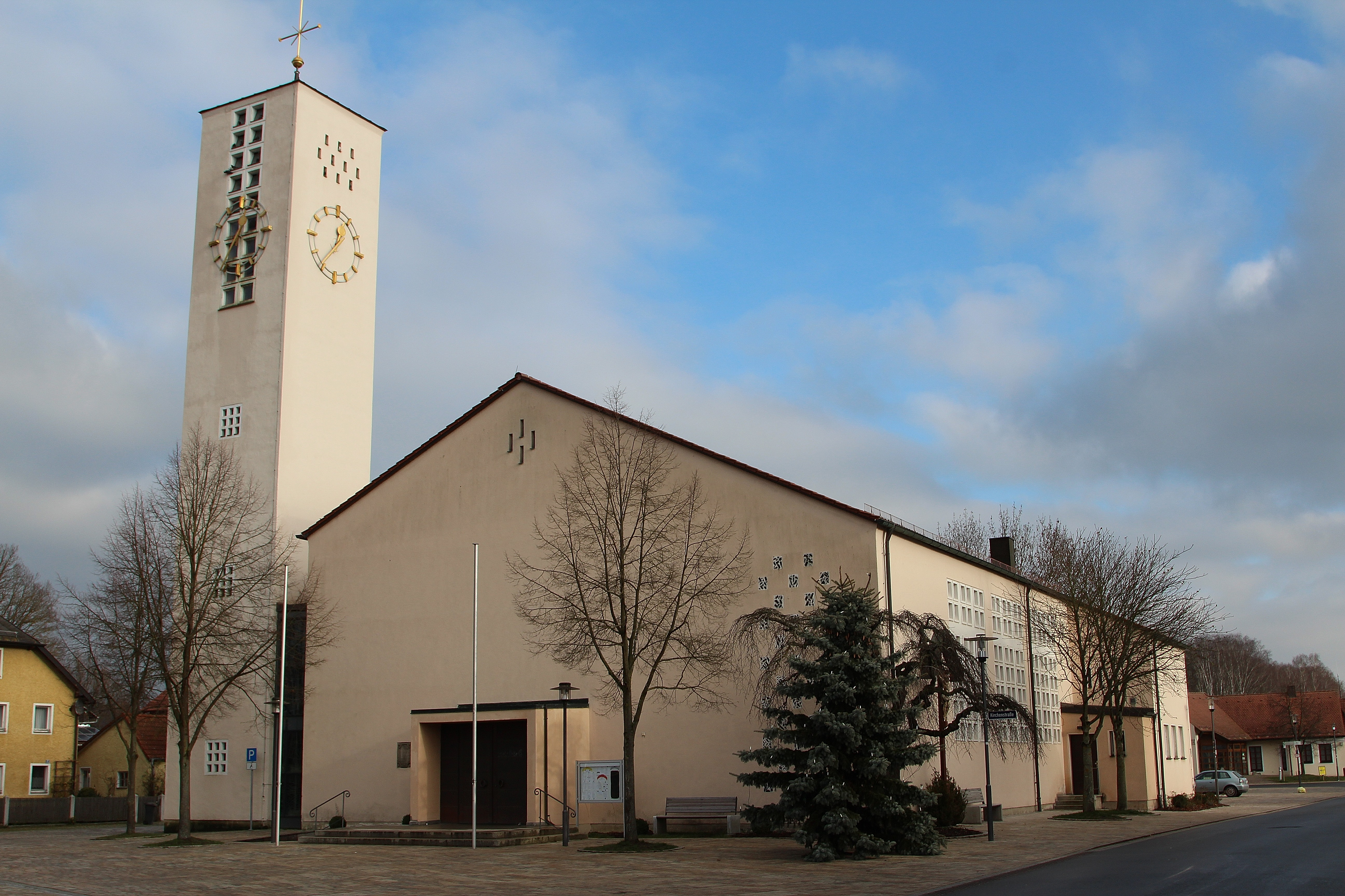 Kirche St. Antonius in Schwarzenbach, Landkreis Neustadt an der Waldnaab, Oberpfalz, Bayern (2015)